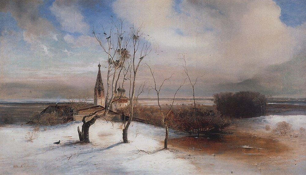 «Весна. Грачи прилетели.»title QS:P1476,ru:"Весна. Грачи прилетели." label QS:Lru,"Весна. Грачи прилетели."